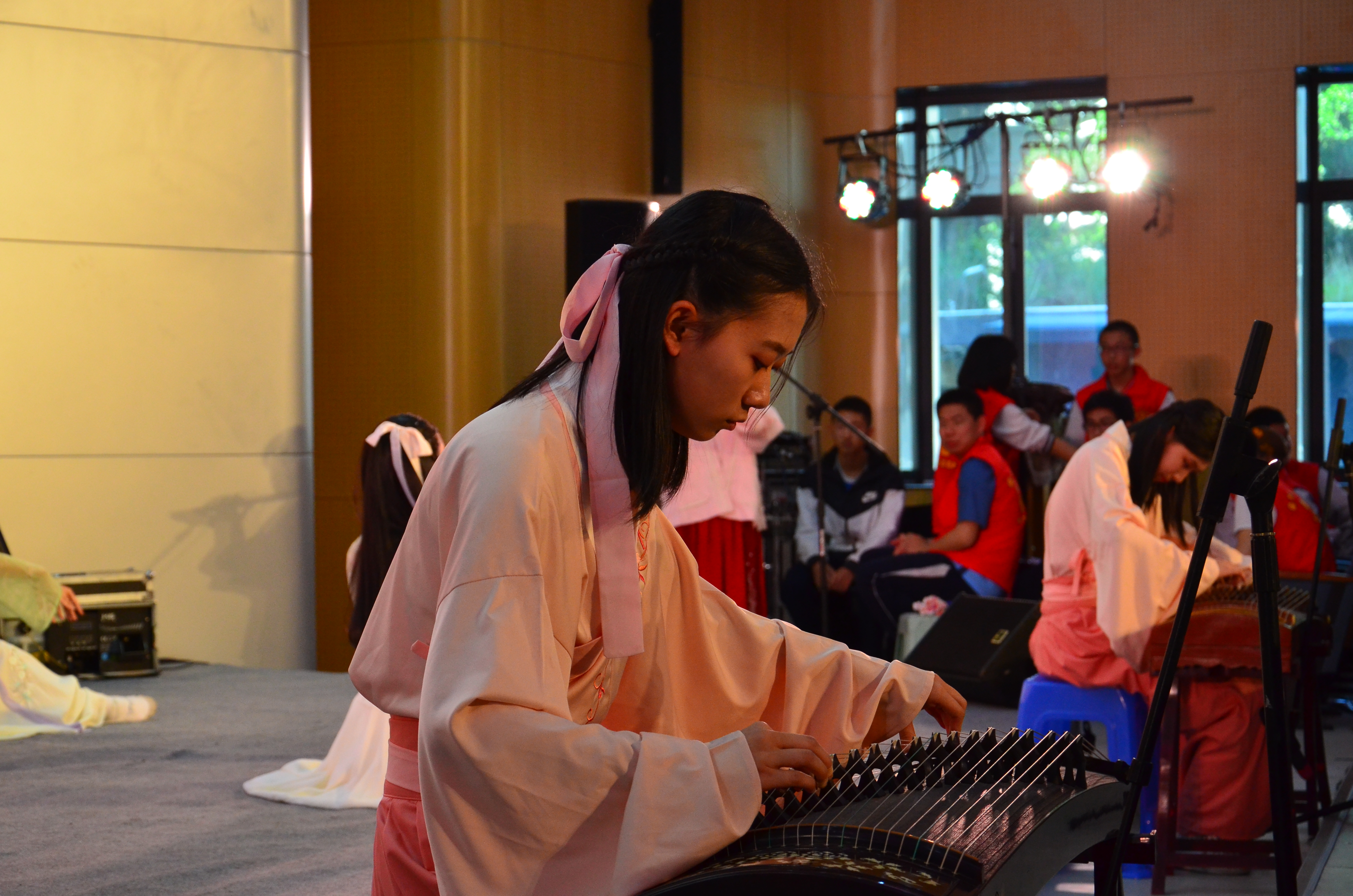 2017福州三中社巡中心舞台古风社表演的歌舞《司花令》。